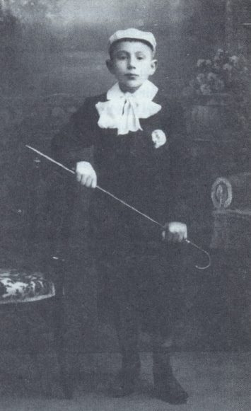 Saul (Paul) de Groot (1899-1986) op twaalfjarige leeftijd.